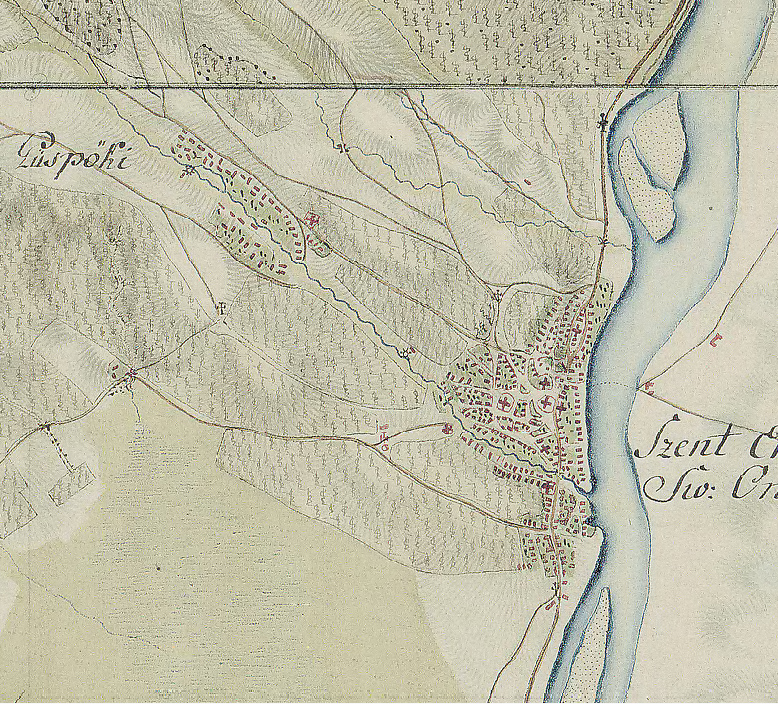 Az első katonai felmérés térképének egy részlete